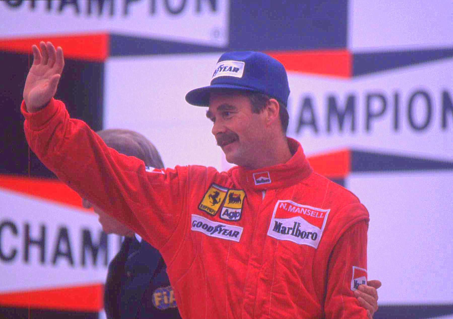 Nigel Mansell- Ferrari. ( 3ieme ) Scan diapo argentique.